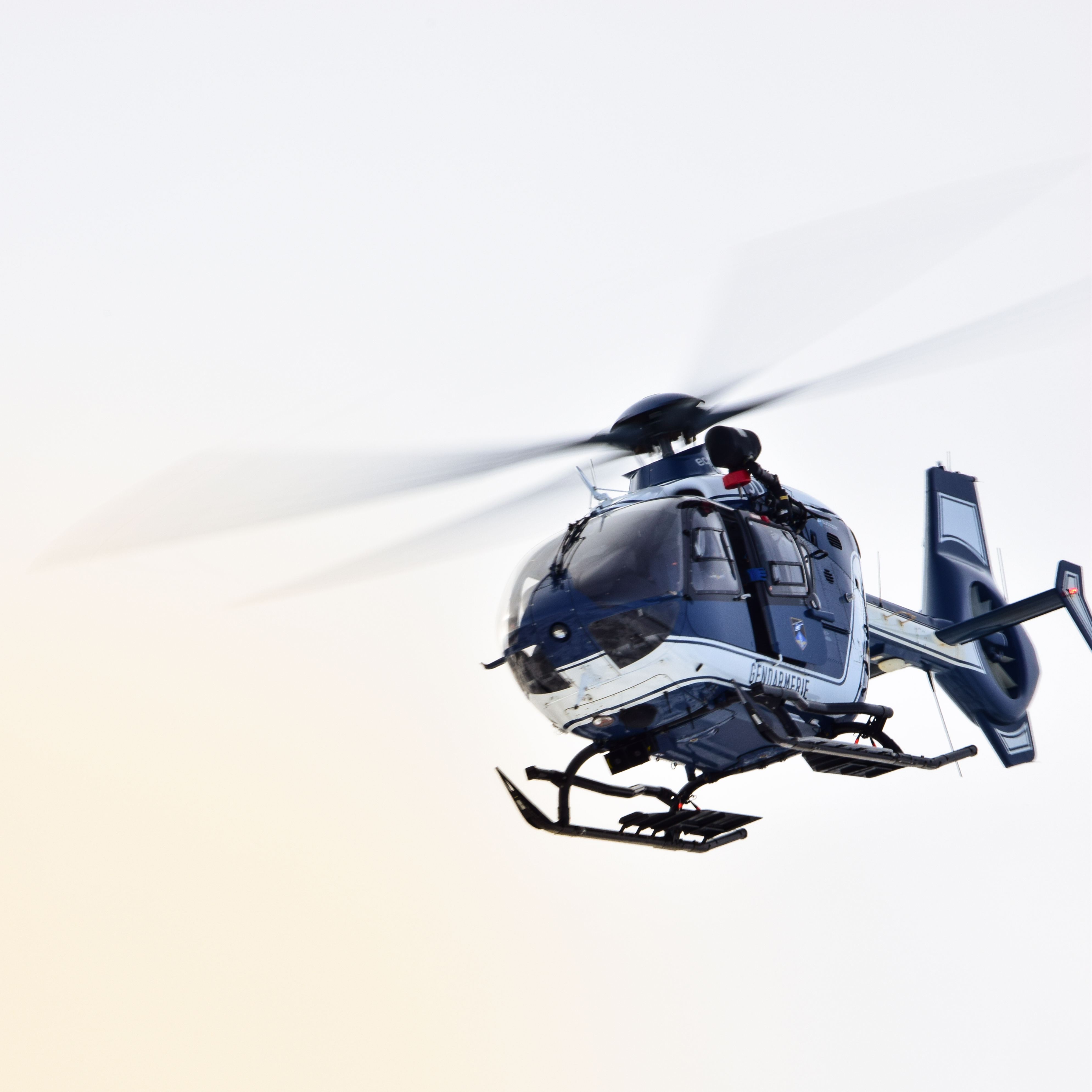 Un hélicoptère de la gendarmerie national française en vol, au dessus du lac blanc, massif des vosges, France